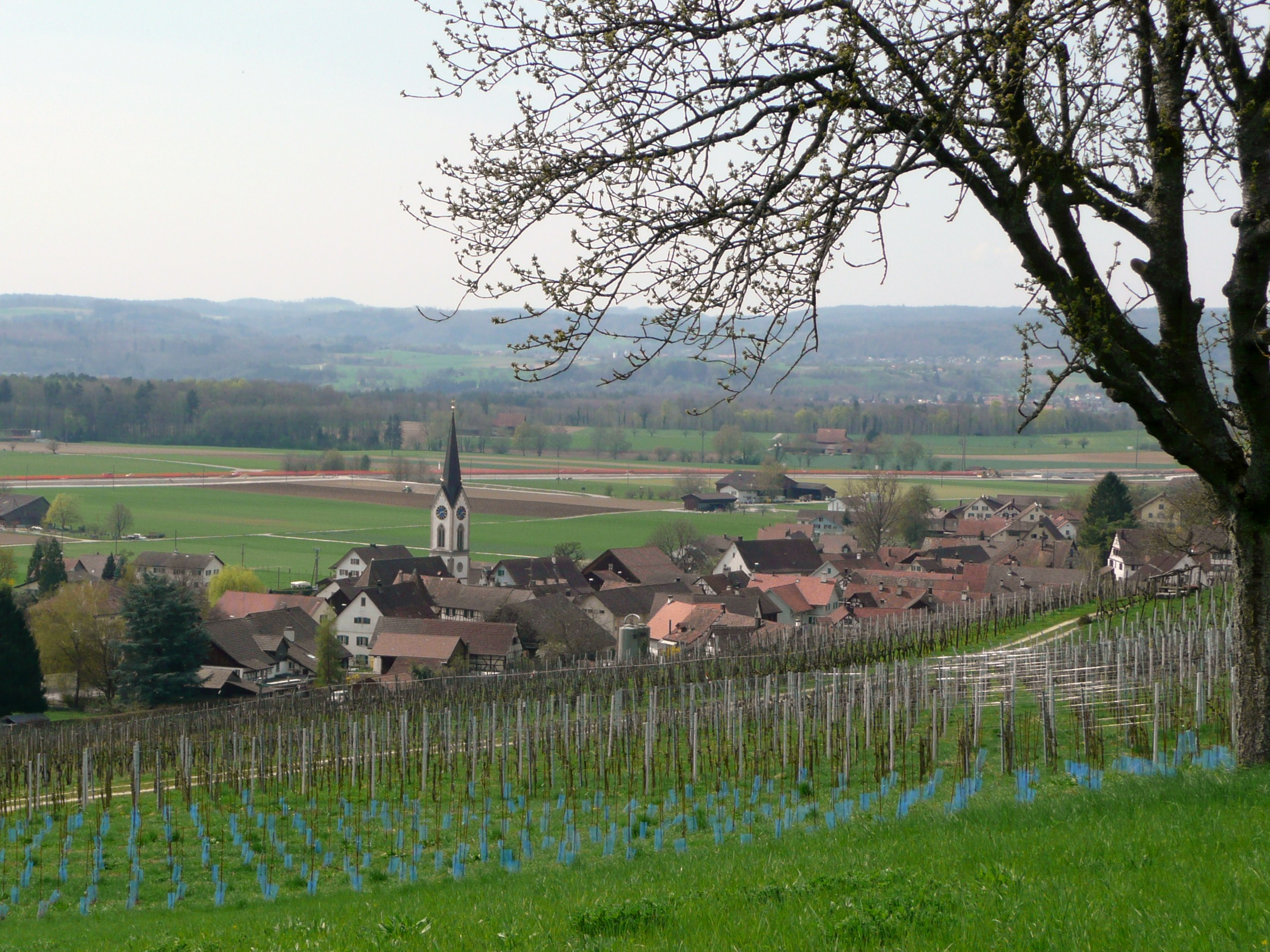 Benken im Kanton Zürich